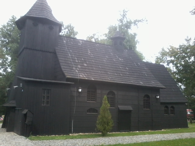 Kościół parafialny pw. św.Marii Magdaleny w Starym Oleśnie